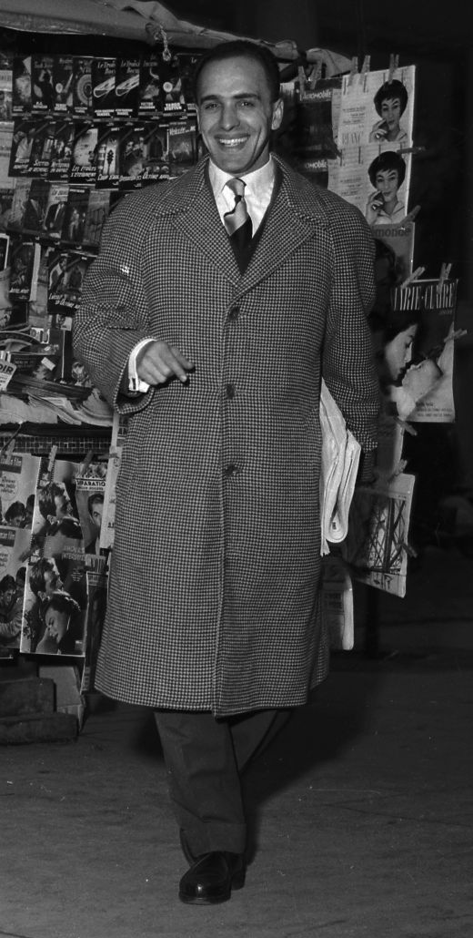 Centre-ville de Toulouse. 2-3 Janvier 1957. Vue du joueur Bouchouk qui livre les journaux du Toulouse Football devant un kiosque. Observation: Négatif du tirage contact 53Fi6428.